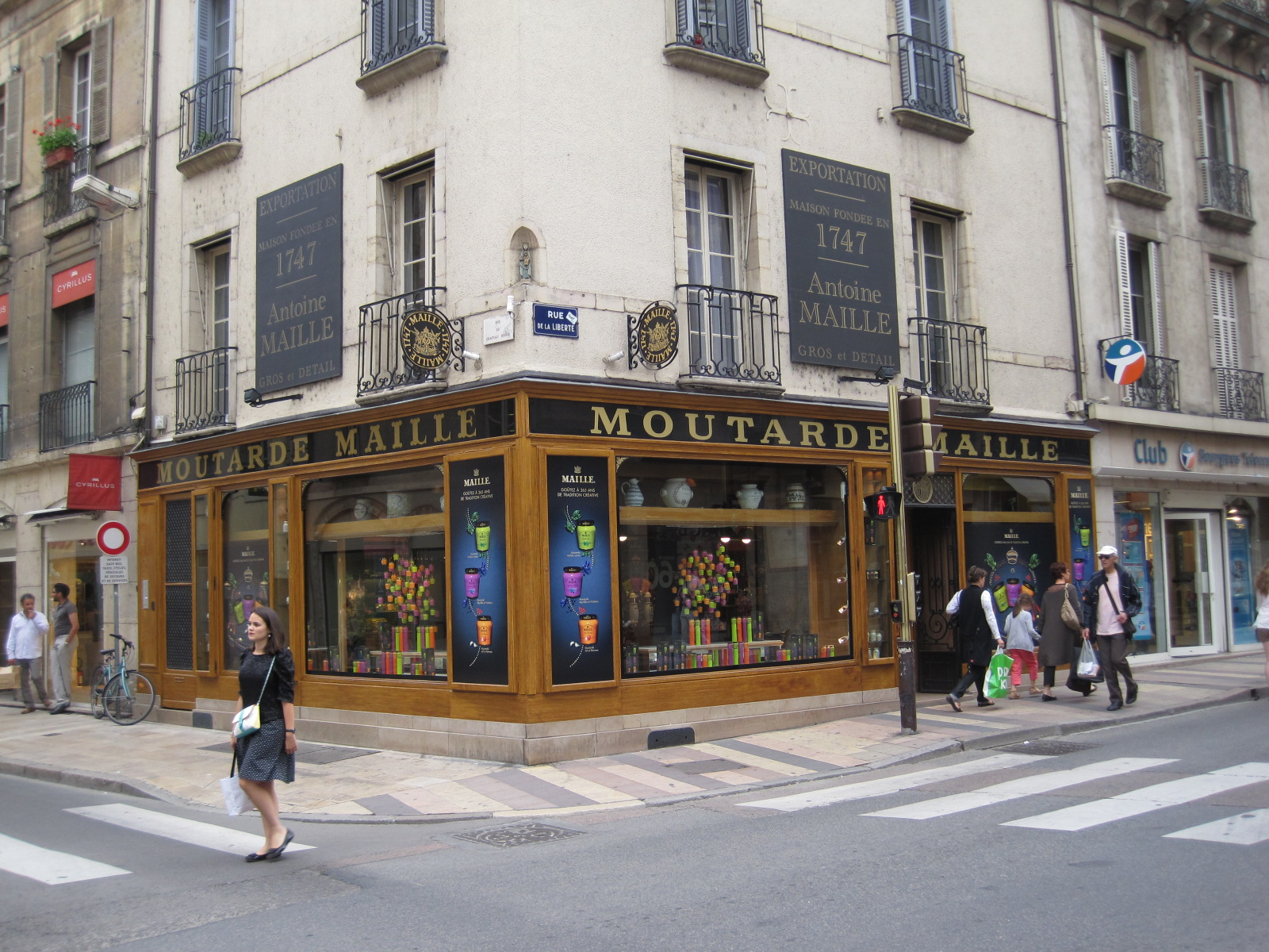 Dijon mustard